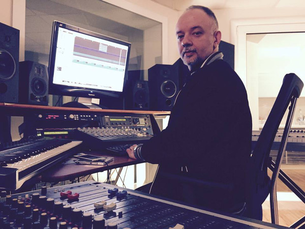 Српски (ћирилица): Alek Aleksov u licnom studiju.